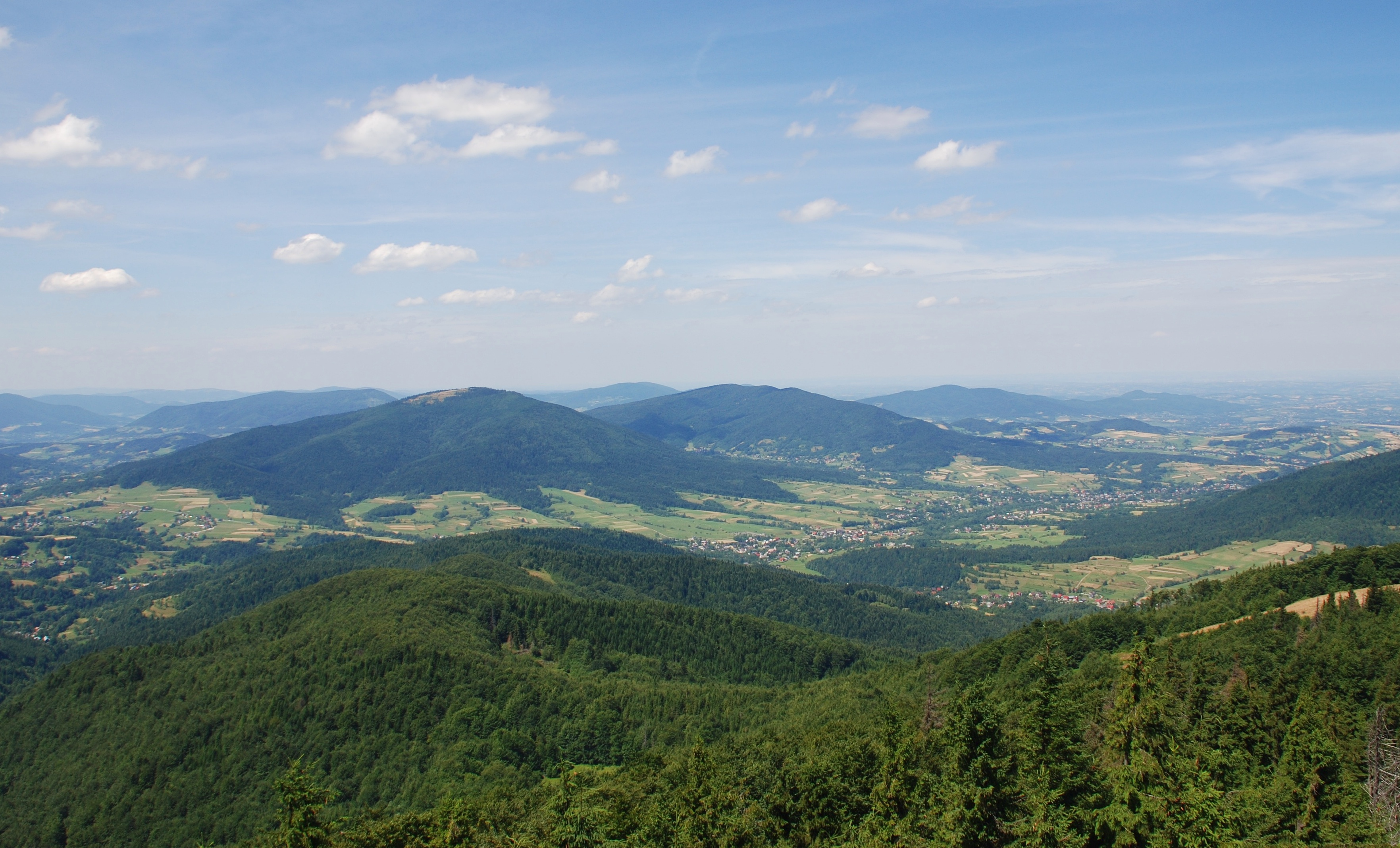 Mogielica 1170 m